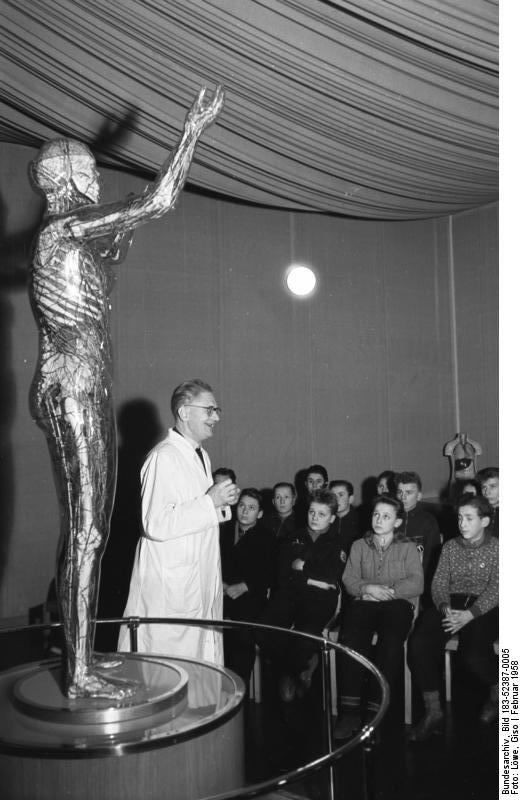 Dresden, Jugendstunde im Hygiene-Museum Zentralbild/Löwe 8.2.1958 Teilnehmer der Jugendweihe besuchen Zentralinstitut für medizinische Aufklärung Innerhalb der Vorbereitungsstunden für die Jugendweihe besuchten Kinder des Dresdner Stadtbezirkes Ost die Ausstellung im Deutschen Hygiene-Museum Dresden - Zentralinstitut für medizinische Aufklärung, wo sie die Entwicklung des Menschen kennen lernten. U.B.z. Herr Brunner vom Hygiene-Museum erklärt den Jungen die "Gläserne Frau".